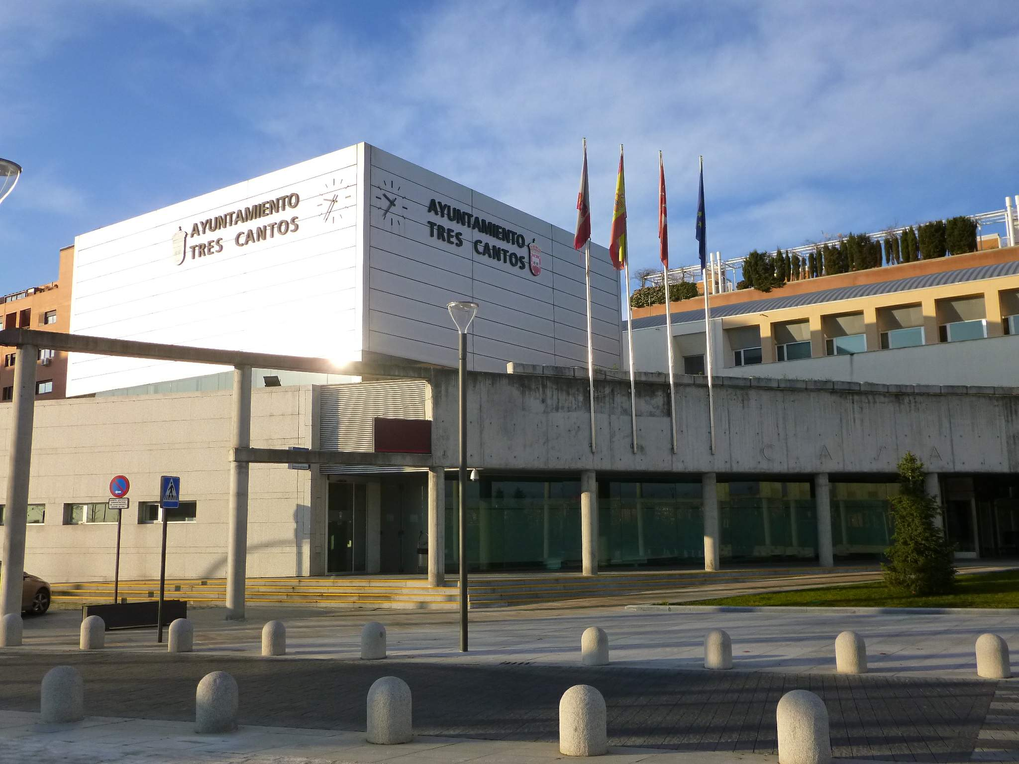 Ayuntamiento de Tres Cantos